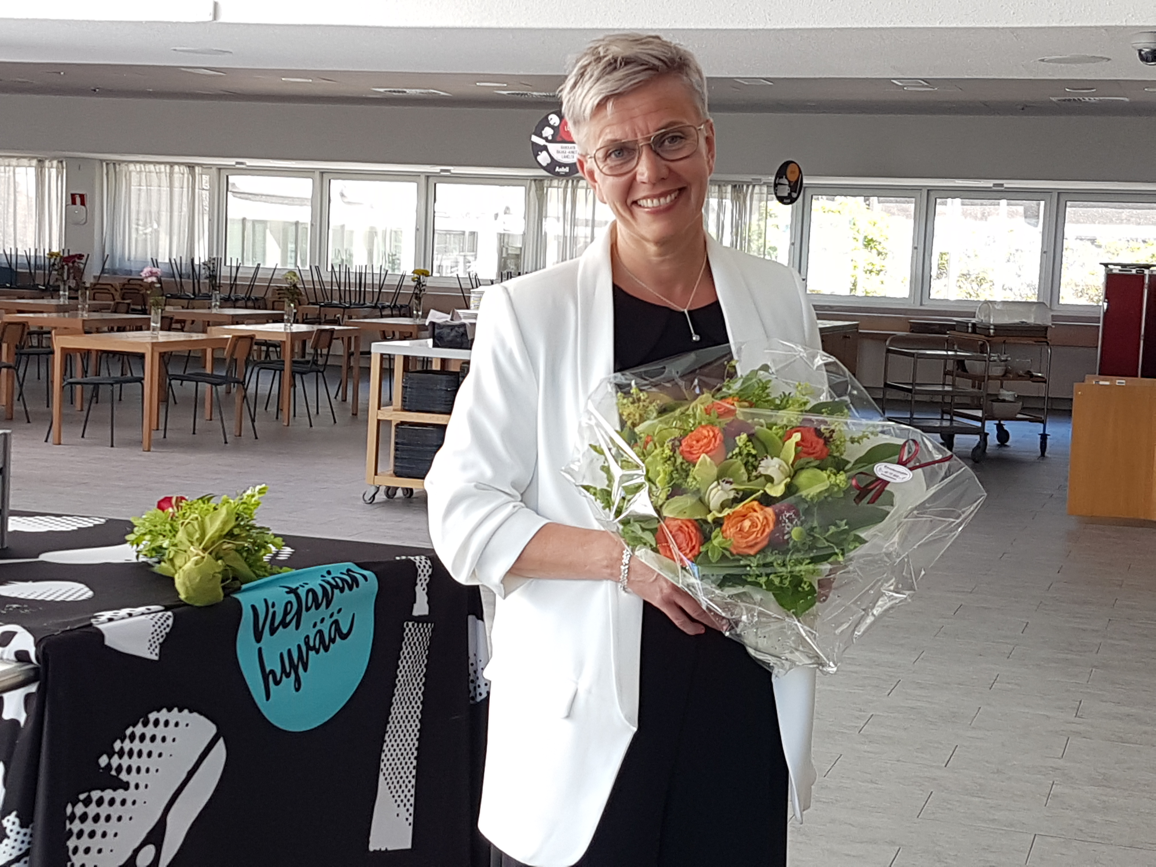 Inger Damlin, Vörå, utsågs i juni 2020 till ny förbundsordförande för FSL.